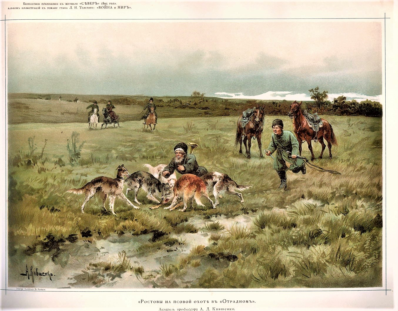 Это акварель русского художника Алексея Кившенко: «Ростовы на псовой охоте в Отрадном».